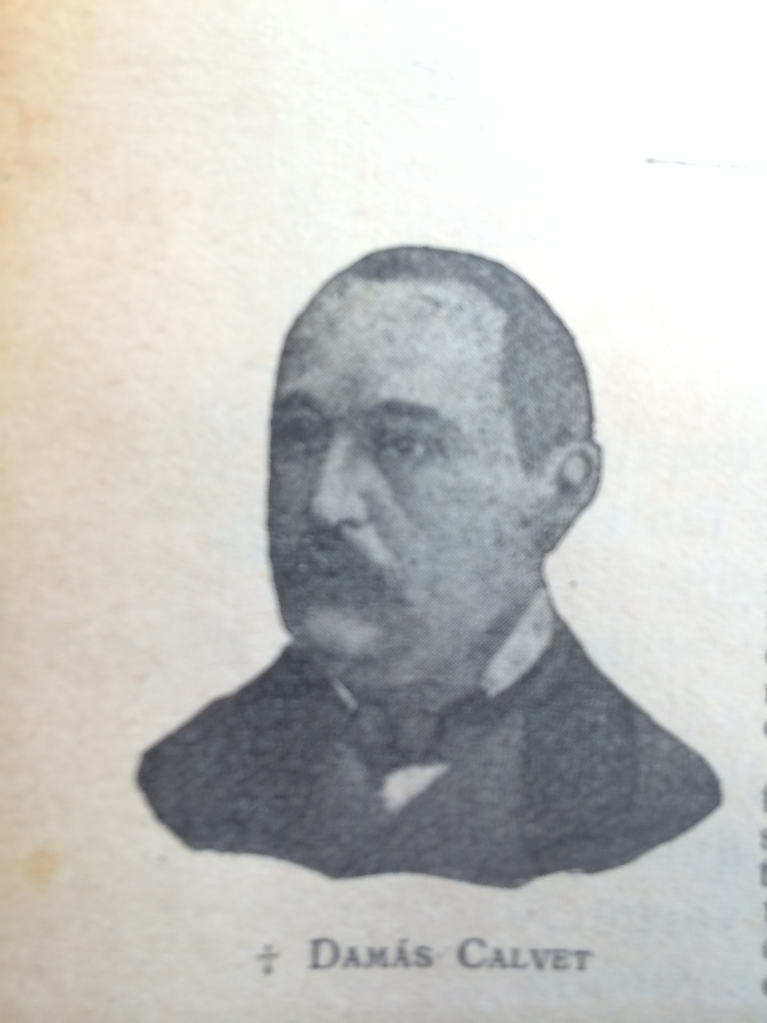 Damas Calvet i de Budallés (Figueres, 11 de desembre de 1836 - Barcelona, 2 de novembre de 1891) fou un enginyer, poeta i dramaturg català.